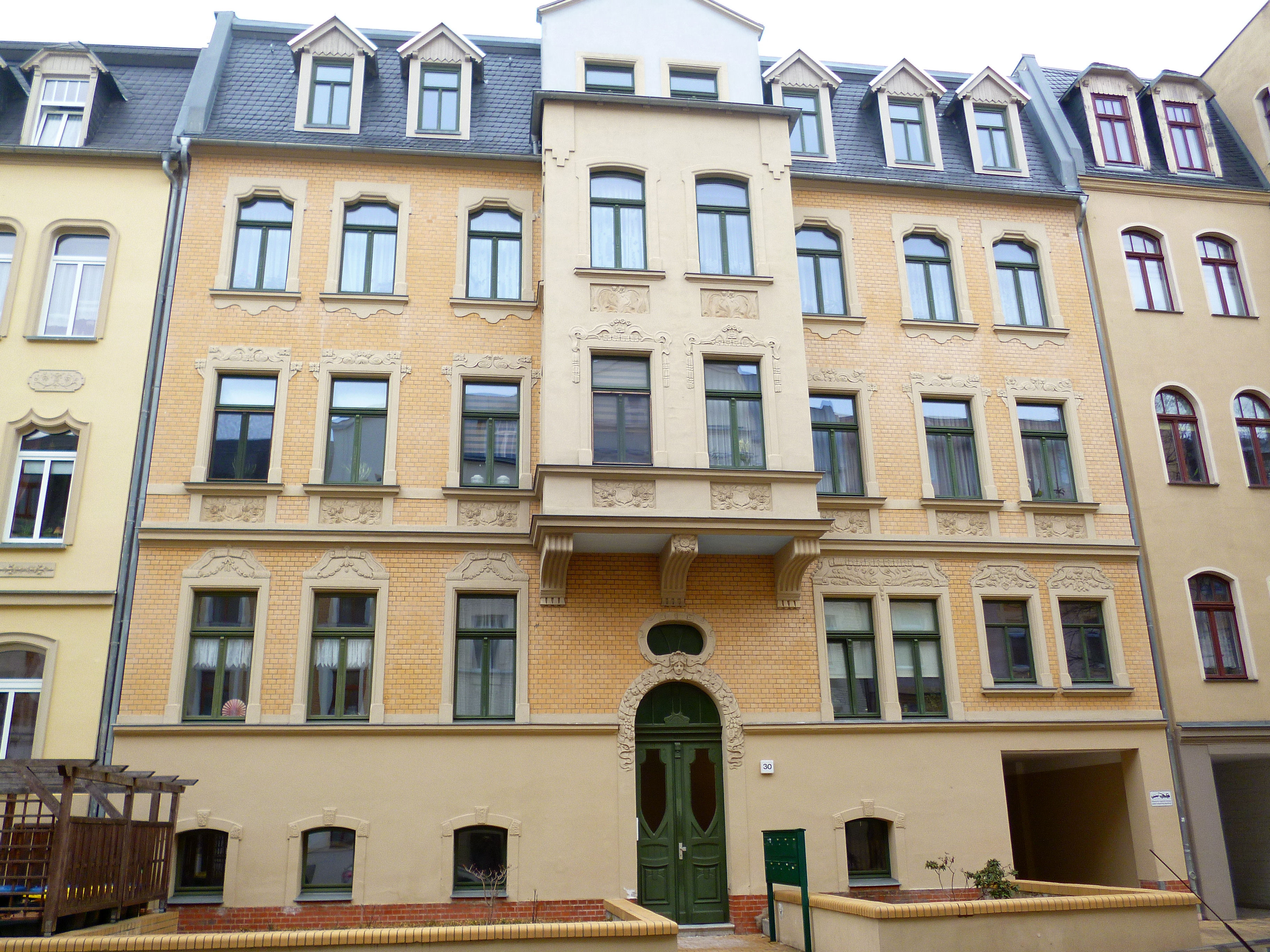 Rudolf-Haym-Straße 30, Halle (Saale)